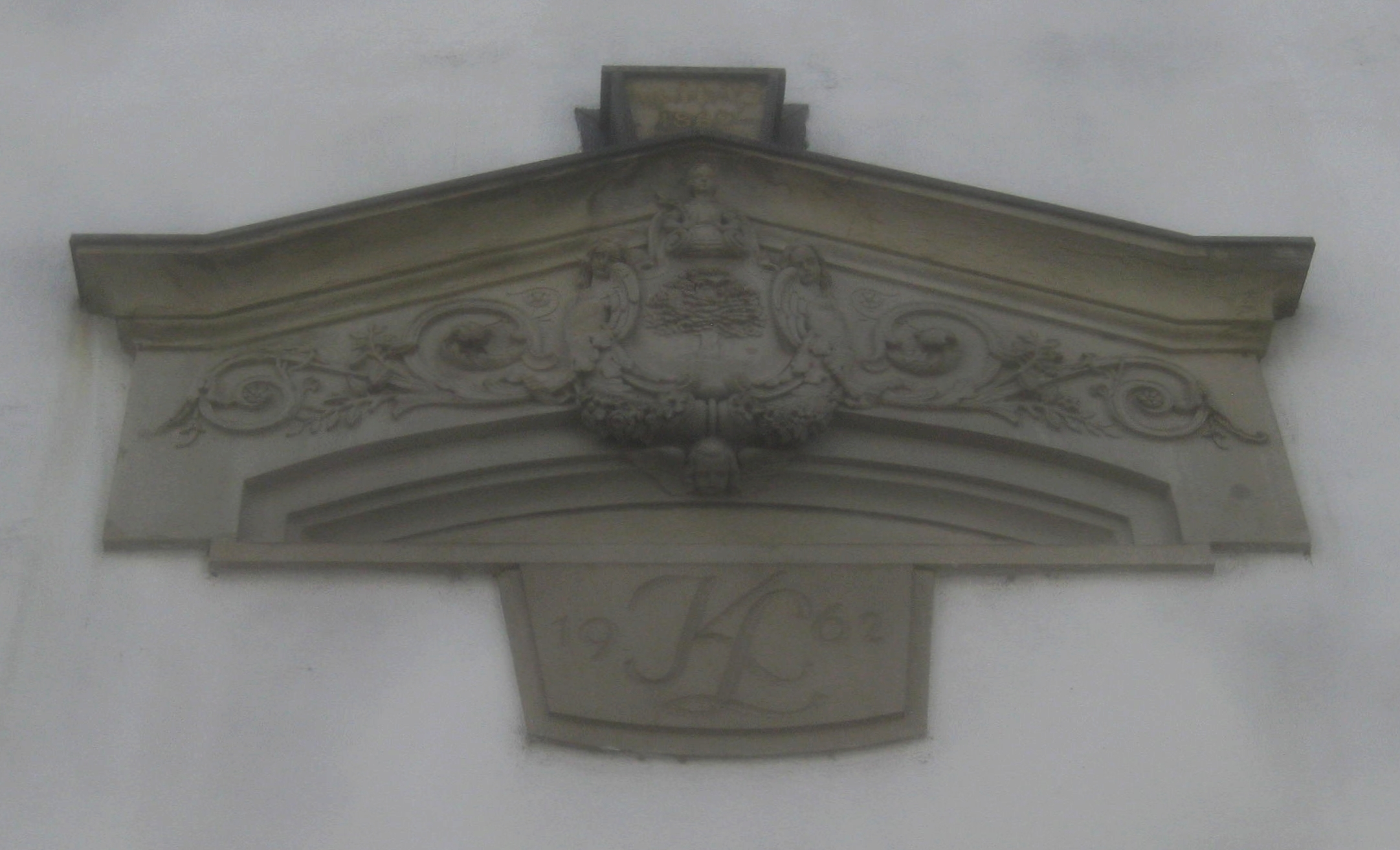 Türgiebel eines im Krieg zerstörten Waldbaur-Gebäudes, Stuttgart, Rotebühlstraße 87G.